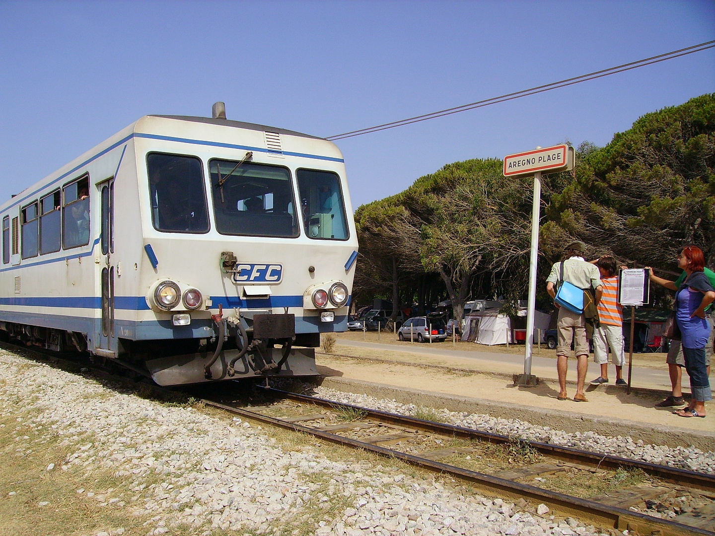 La halte d'Aregno des chemins de fer de la Corse le 22 juillet 2009.